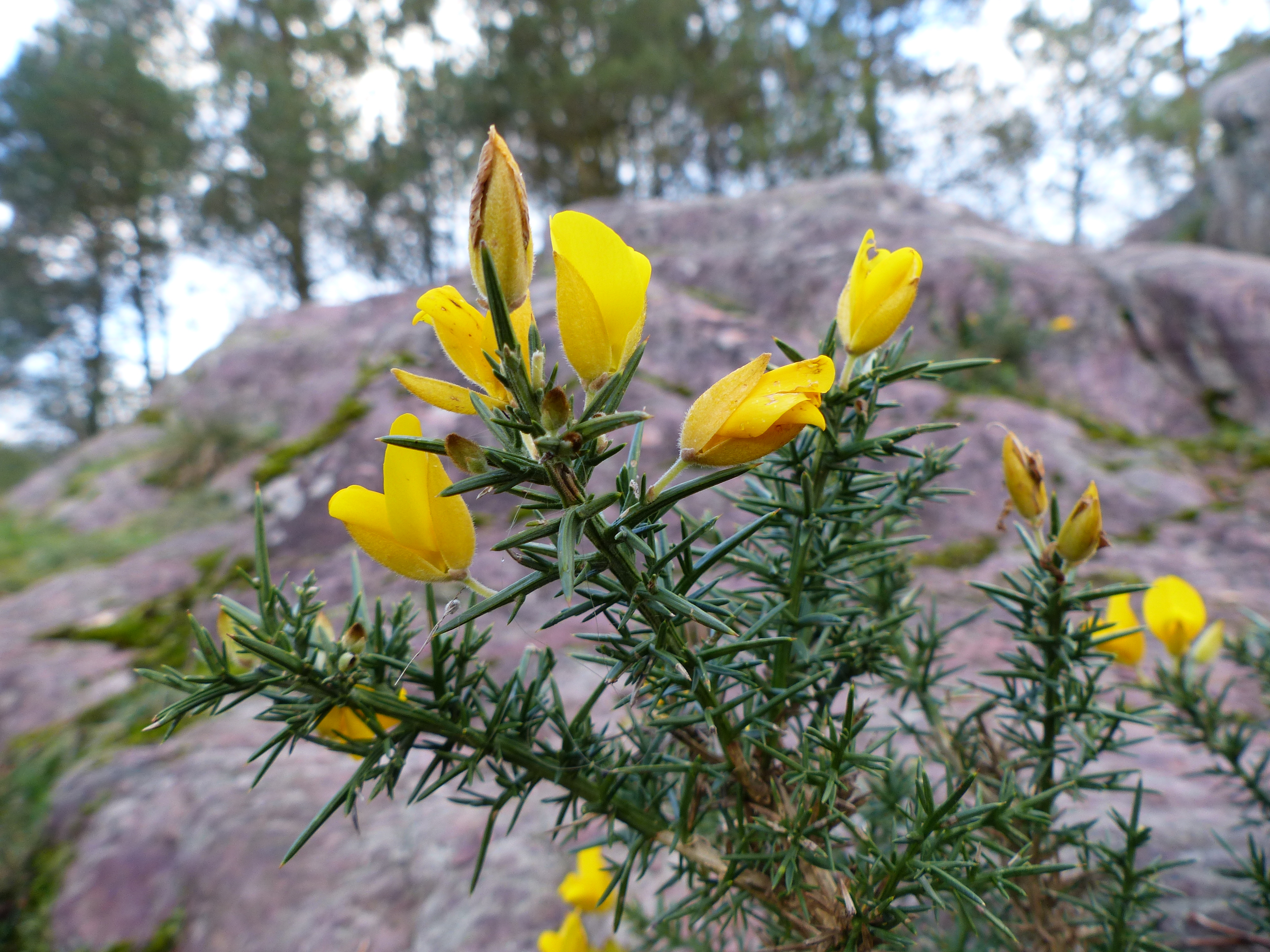 Ajonc d'Europe au Val sans Retour, Bretagne, France